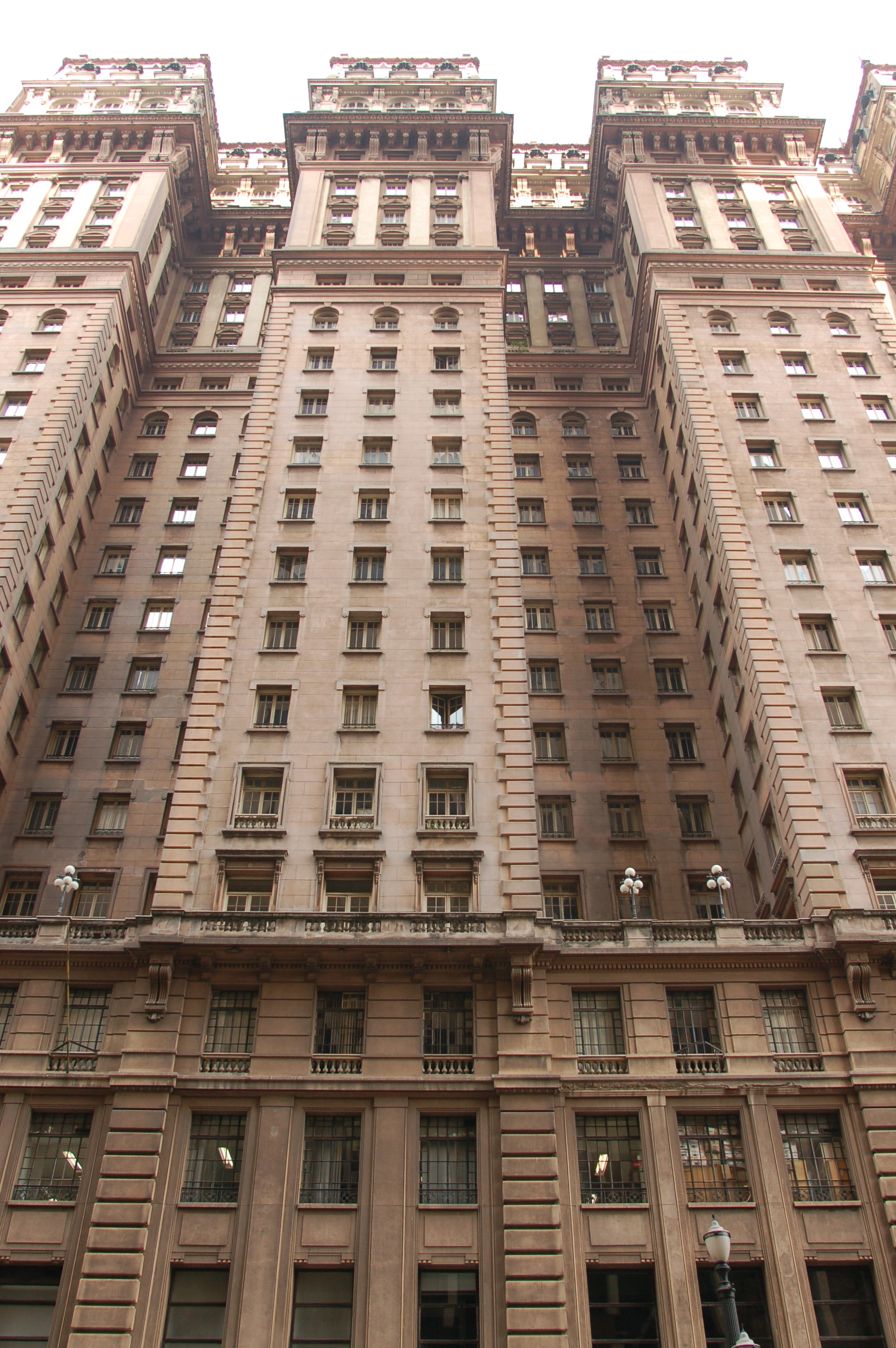 Martinelli building in São Paulo, Brazil